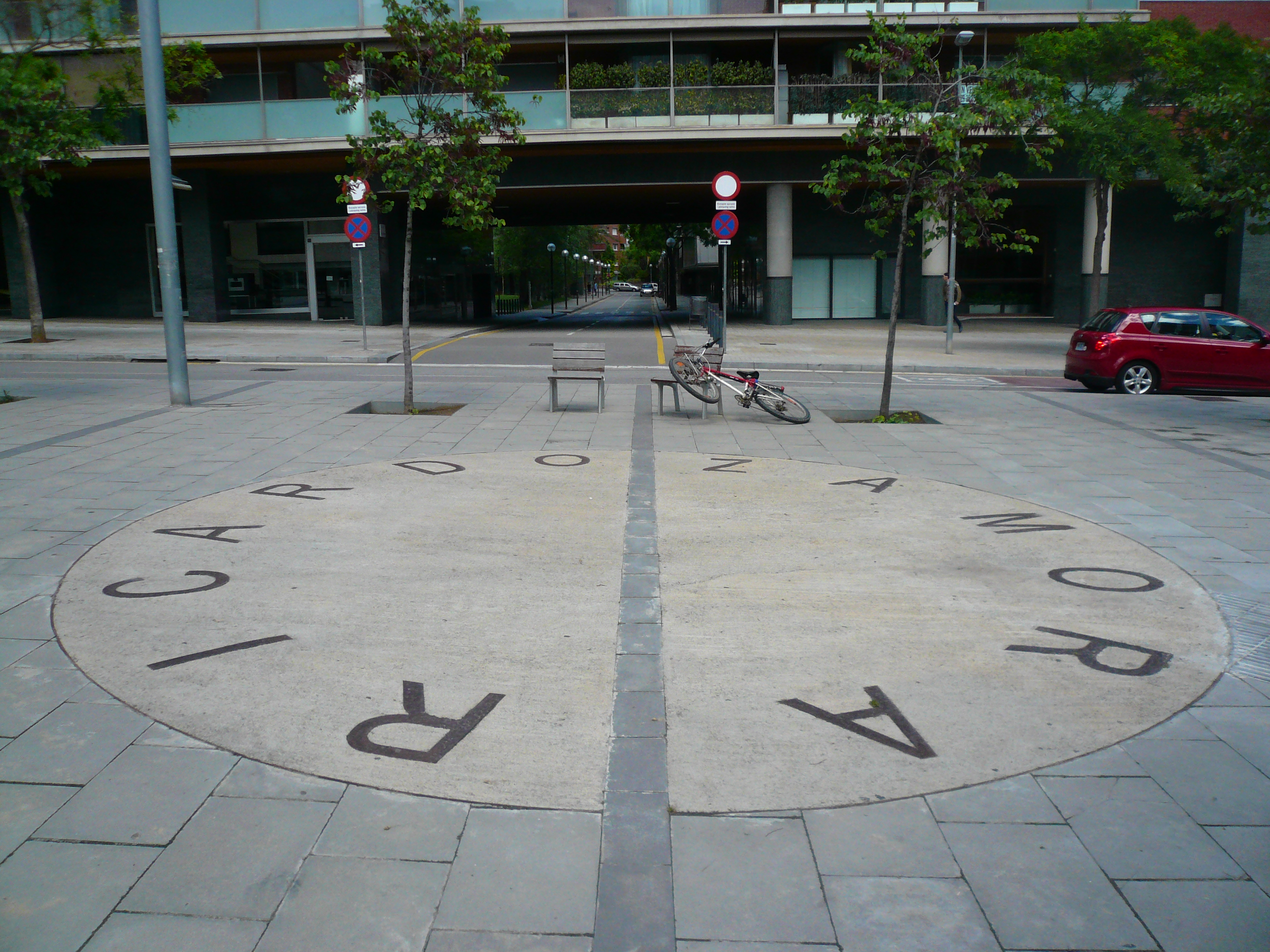 Ricardo Zamora. Av. Sarrià amb Ricardo Villa (Barcelona). Material: formigó i acer. 28″ N, 2° 07′ 58.44″ E